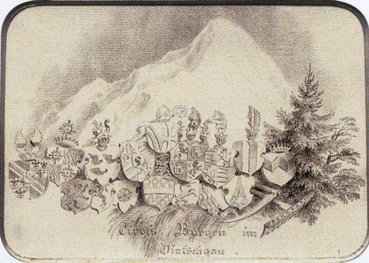 Titelblatt zu "Tirols Burgen im Vinschgau"